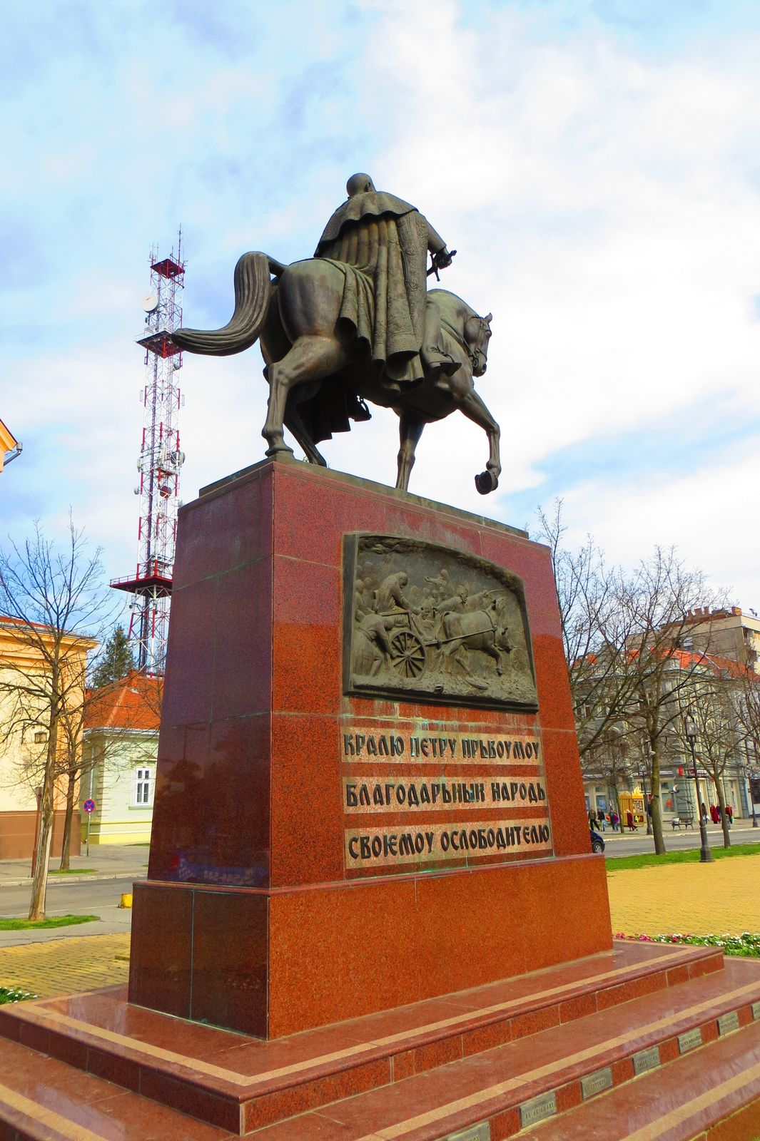 Trg slobode